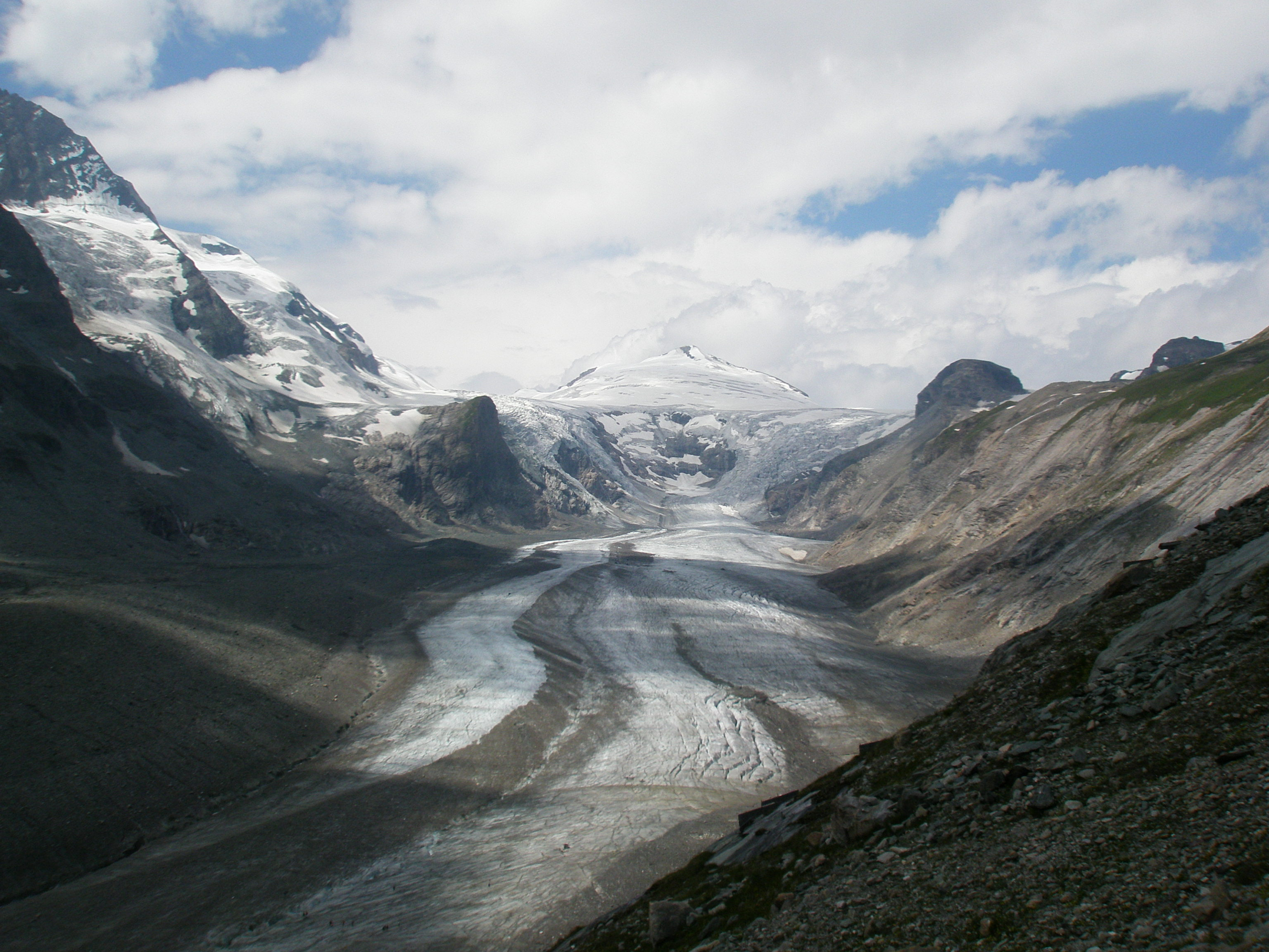 Pasterze im Jahr 2008